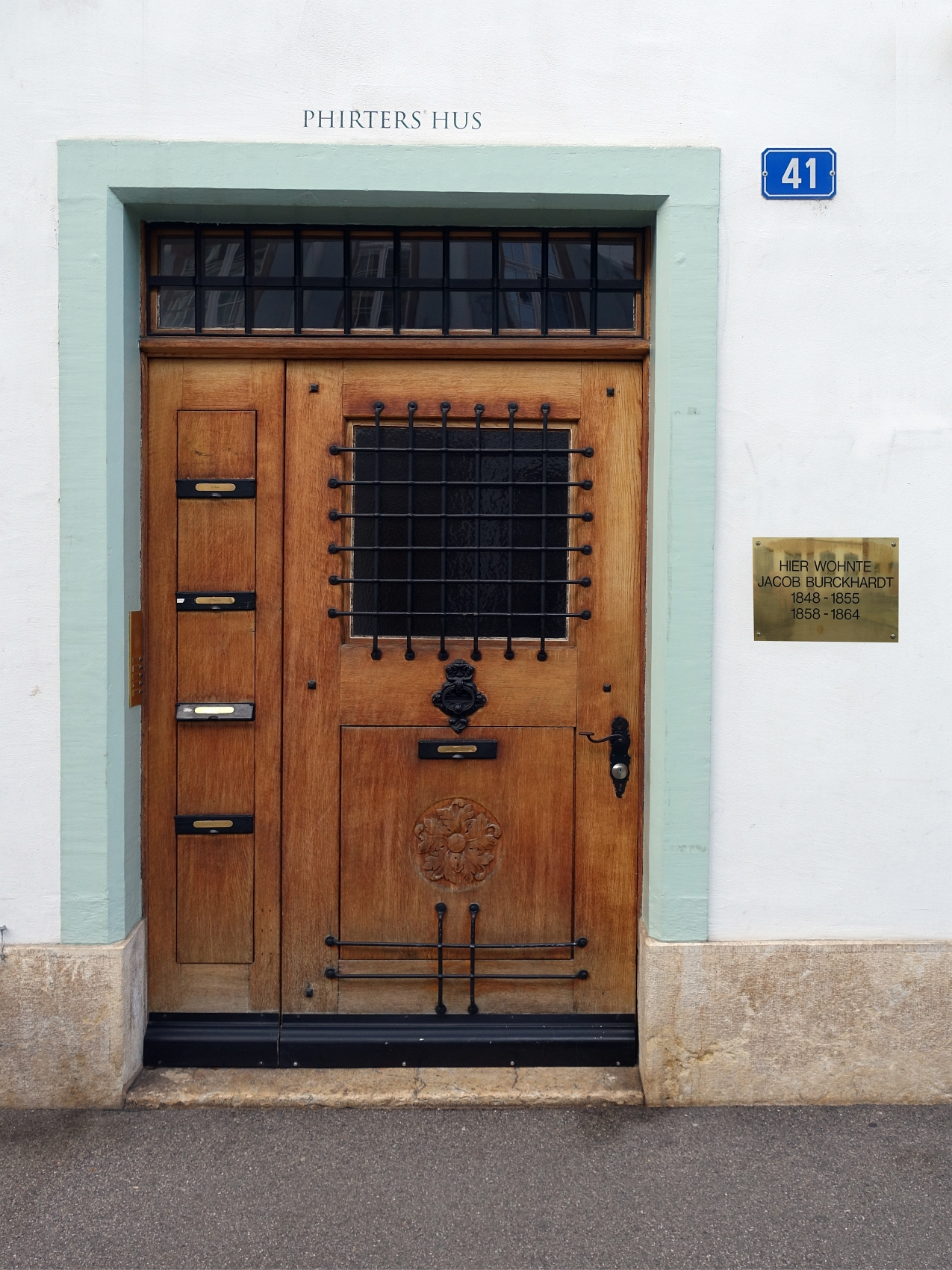 Wohnhaus an der St. Alban-Vorstadt 41 in Basel von Jakob Burckhardt (1818–1897) Kunsthistoriker. (1848–1855) und (1858–1864)